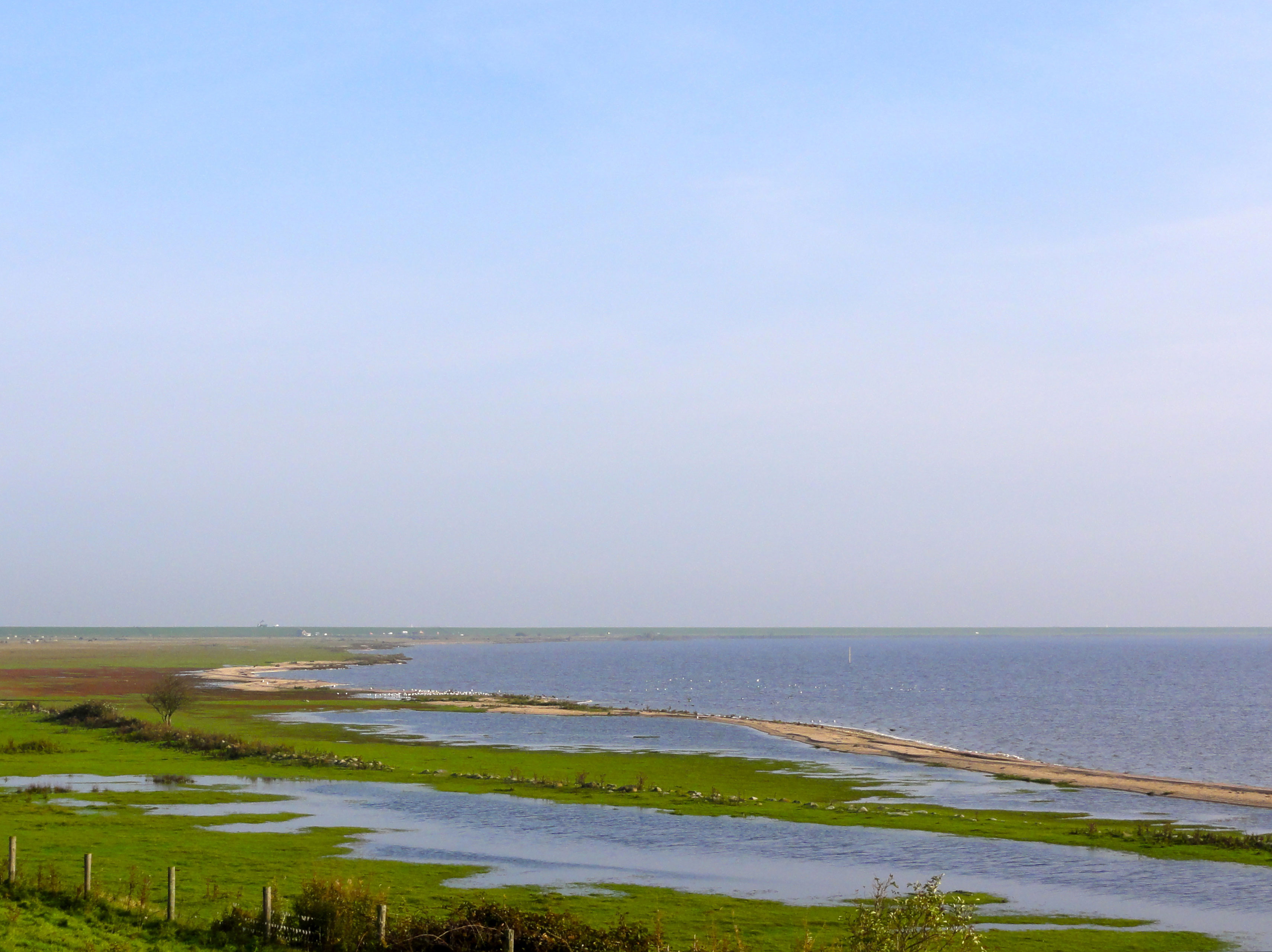 Lauwersmeer